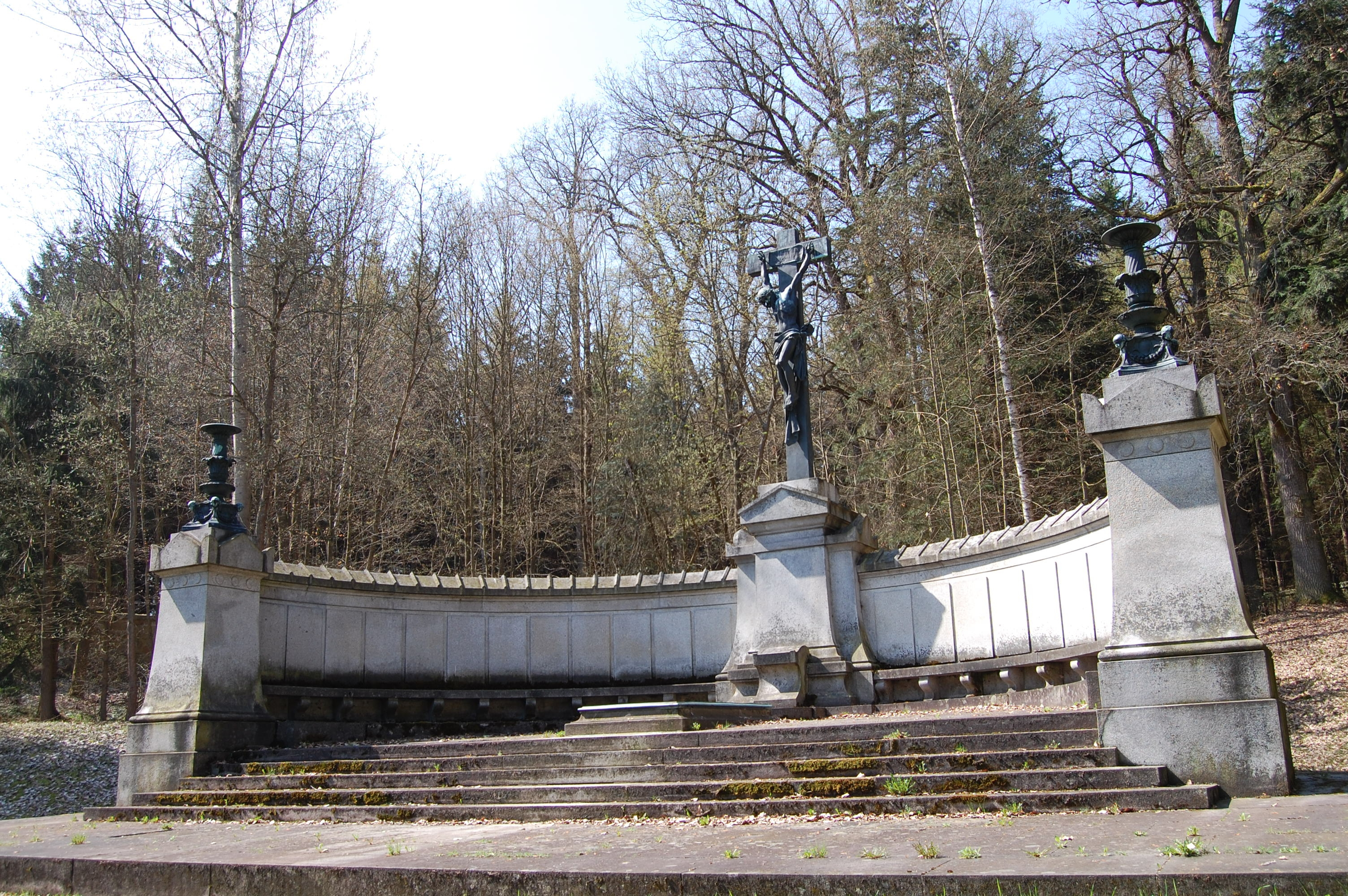 Pomník a hrobka Ringhofferů (Kamenice), Zaječí vrch, Kamenice